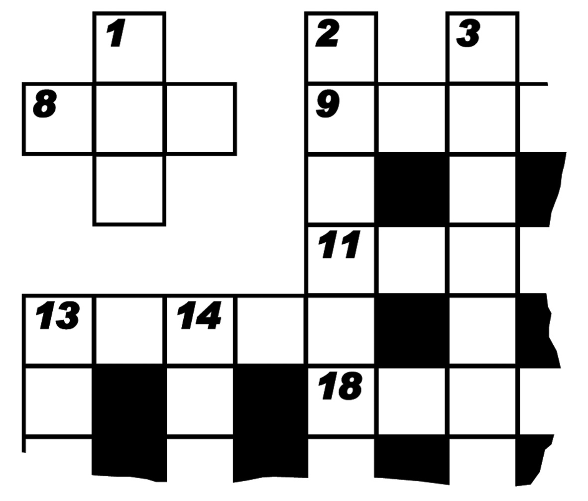 Խաչբառի ցանցերի օրինակներ